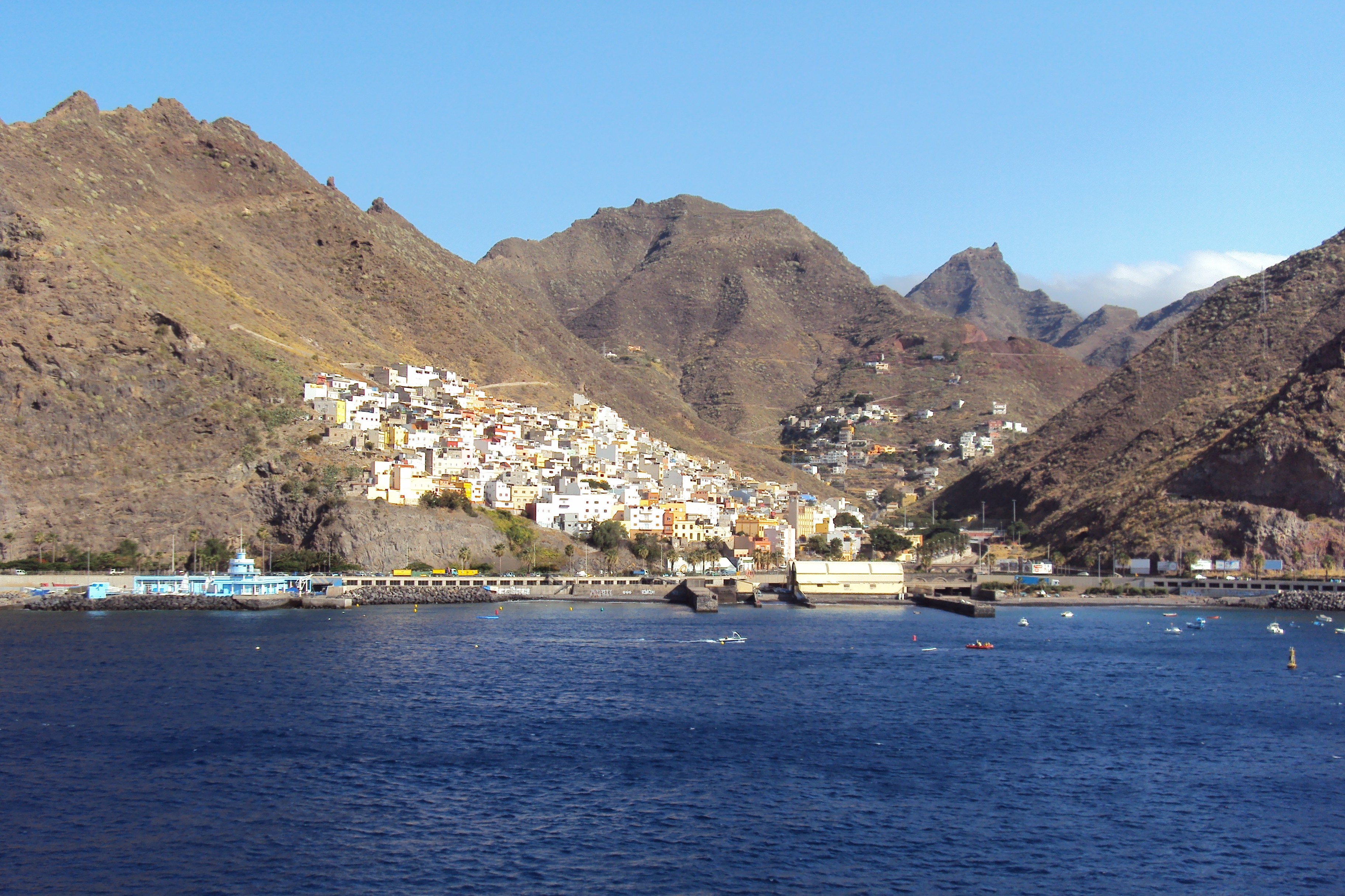 Valle Seco, Tenerife